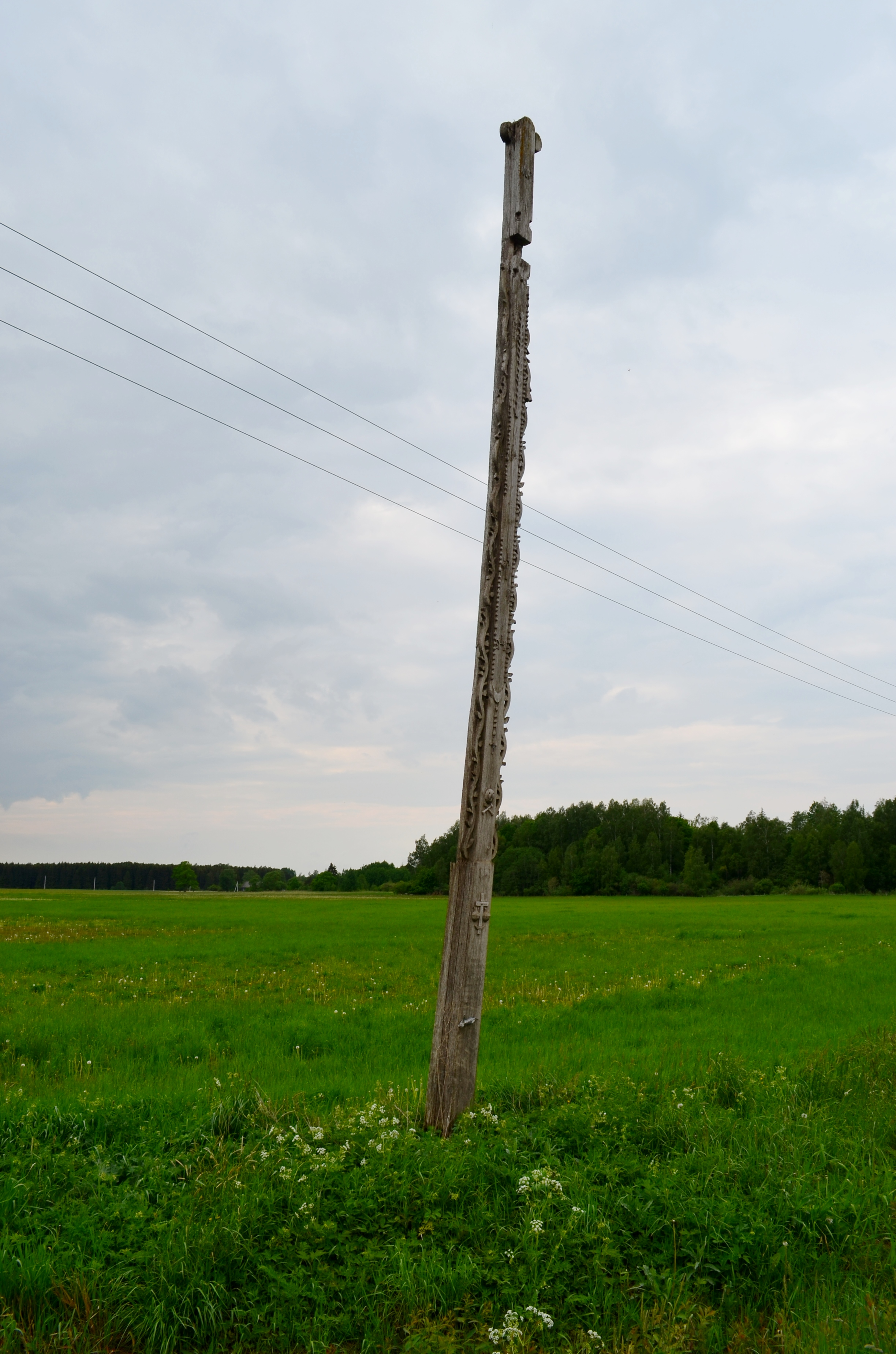 Trankiniai, Raseinių r.